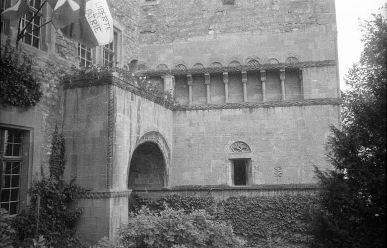 Château de Neuchâtel Motiv: Neuchâtel Kategori: Slott Château de Neuchâtel.